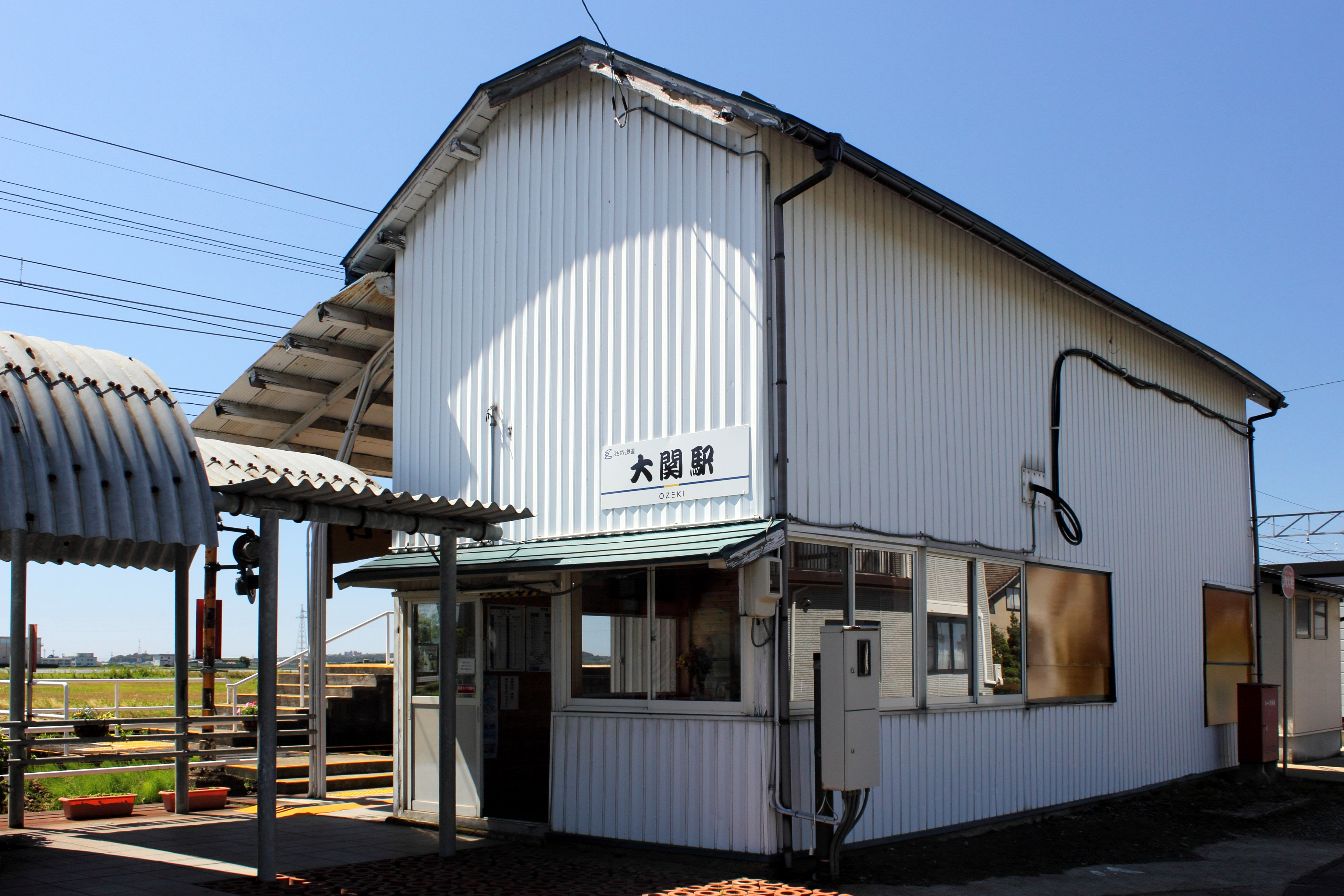 えちぜん鉄道 大関駅 相撲文字変更後の駅名表示